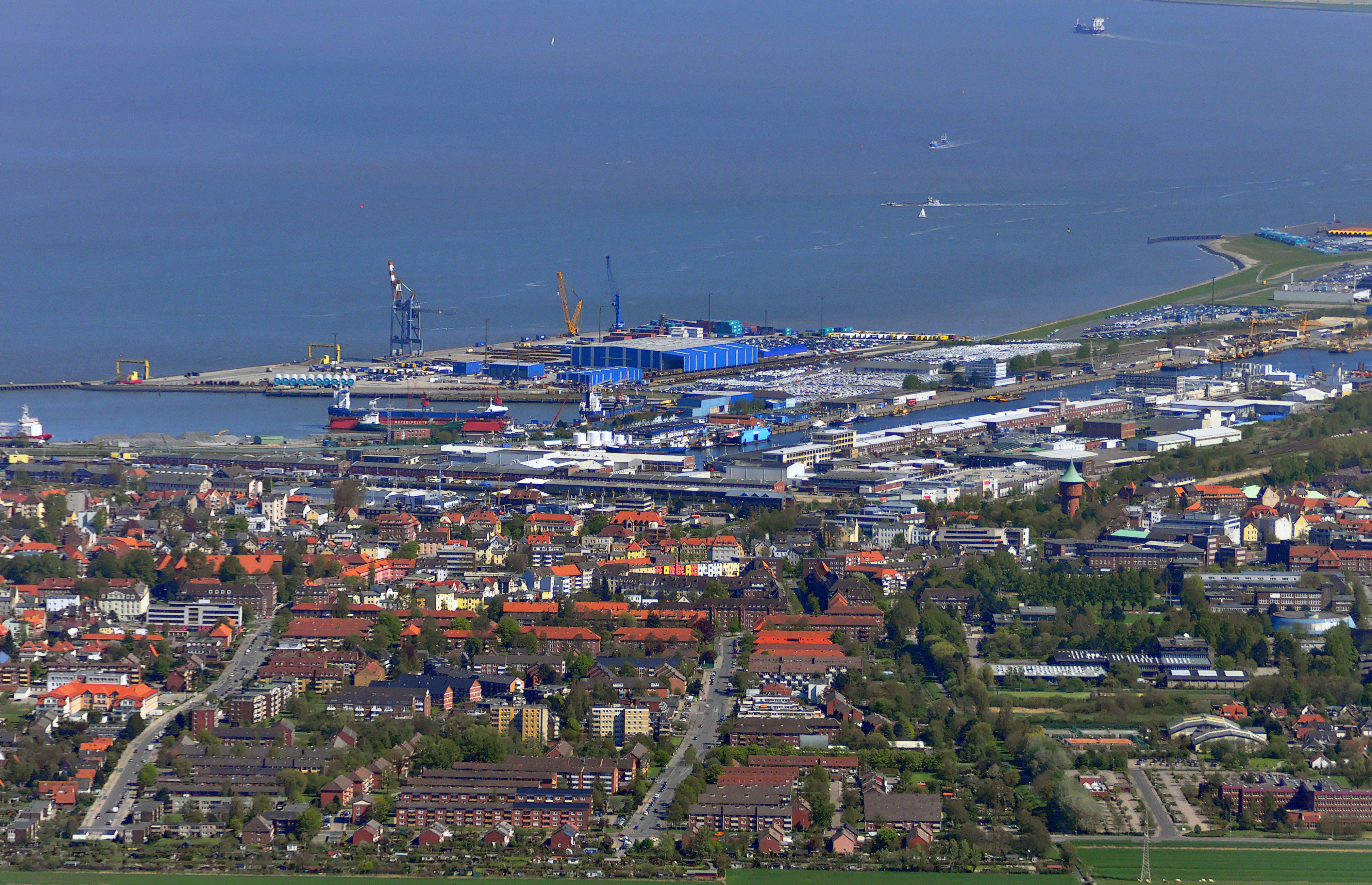 Luftbilder von der Nordseeküste 2012-05; Blick über die Südstadt von Cuxhaven zu den älteren Hafenanlagen (Amerikahafen und Neuer Fischereihafen)